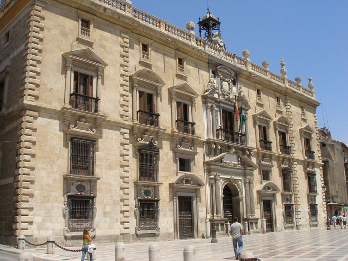 Royal High Court, in Granada, Spain, renacentist building of the 16th century at Plaza Nueva. Real Chancillería (hoy sede del Tribunal Superior de Justicia de Andalucía), edificio renacentista del siglo XVI. Plaza Nueva, Granada, España.